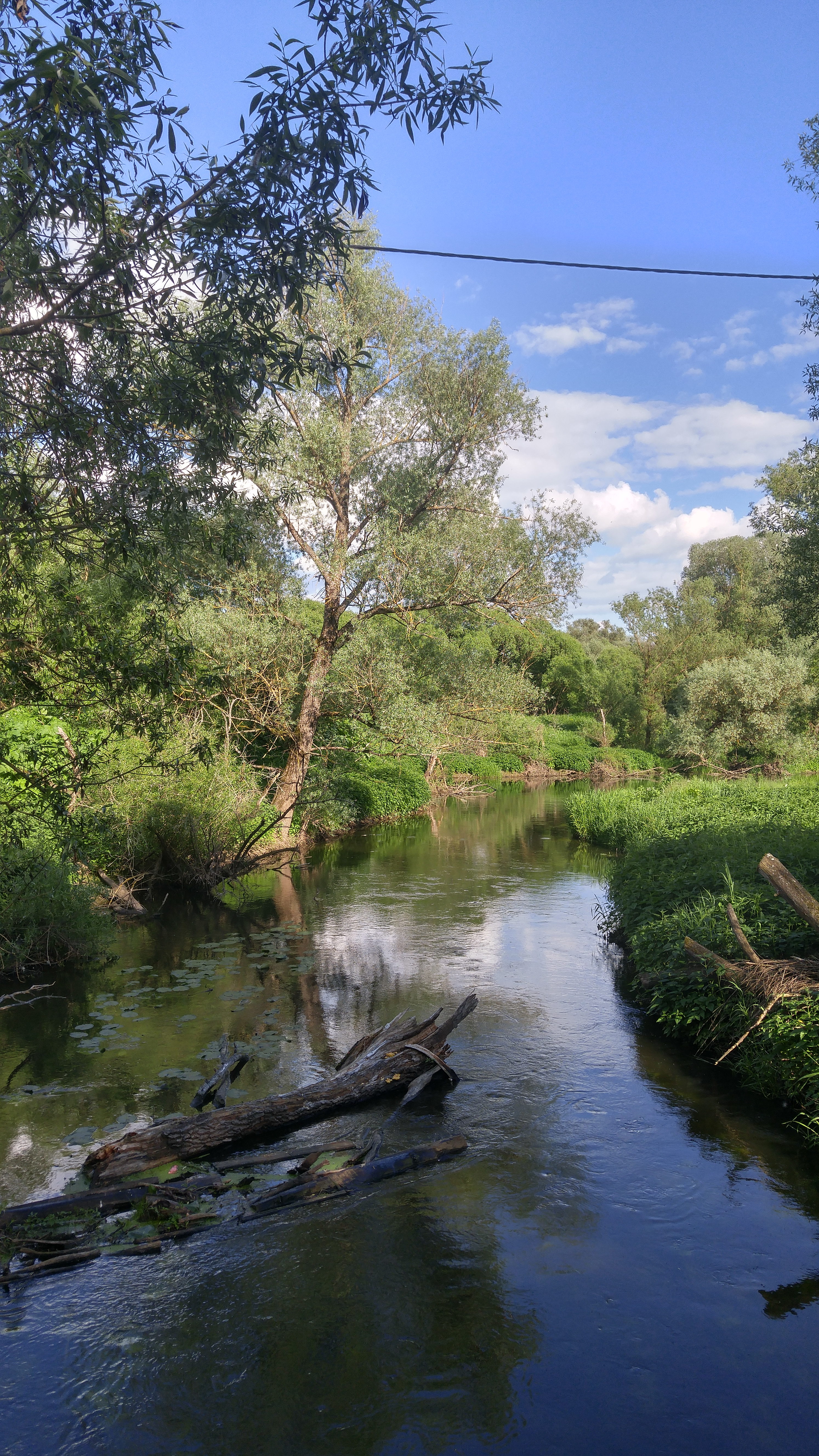 Река Истья в деревне Киселёво